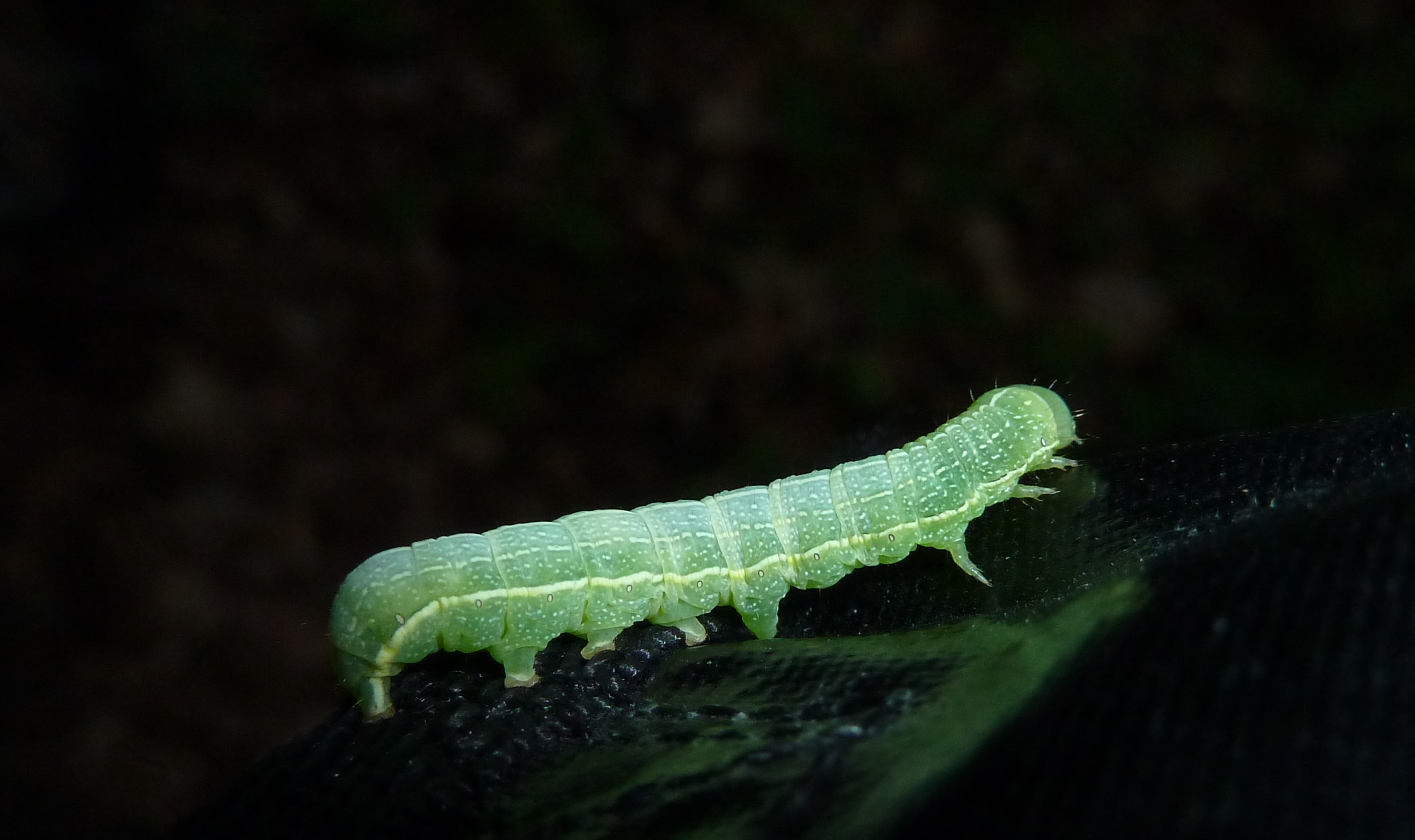 Variable Kätzcheneule (Orthosia (Orthosia) incerta) im Göttinger Wald südlich der Mackenröder Spitze, Südniedersachsen